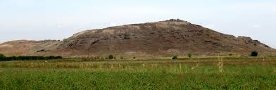 Նկար